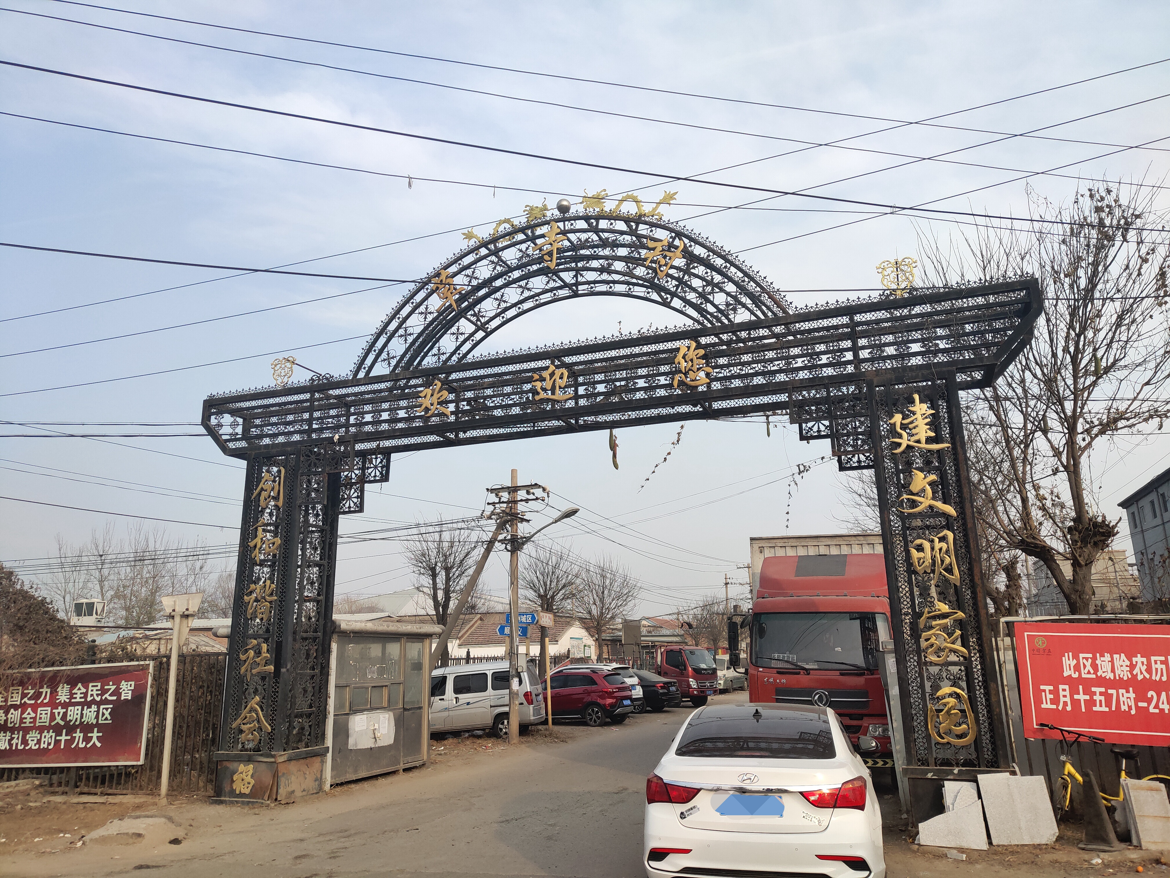 中国北京市通州区宋庄镇草寺村村口的照片 自己拍摄